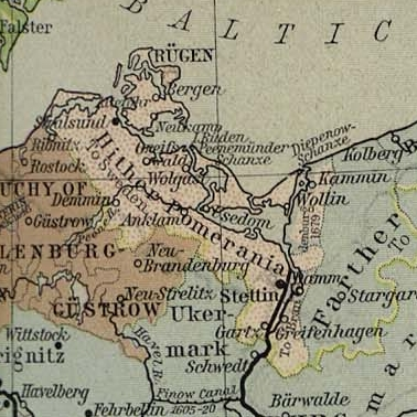 Svensk Forpommern, klippet fra File:Central europe 1648 sheperd.jpg